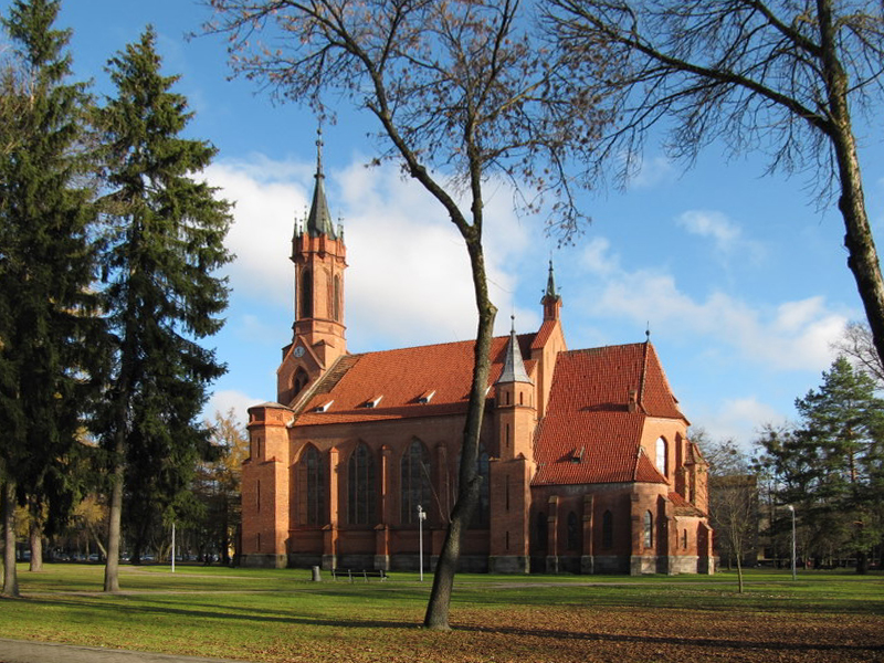 Druskininkai